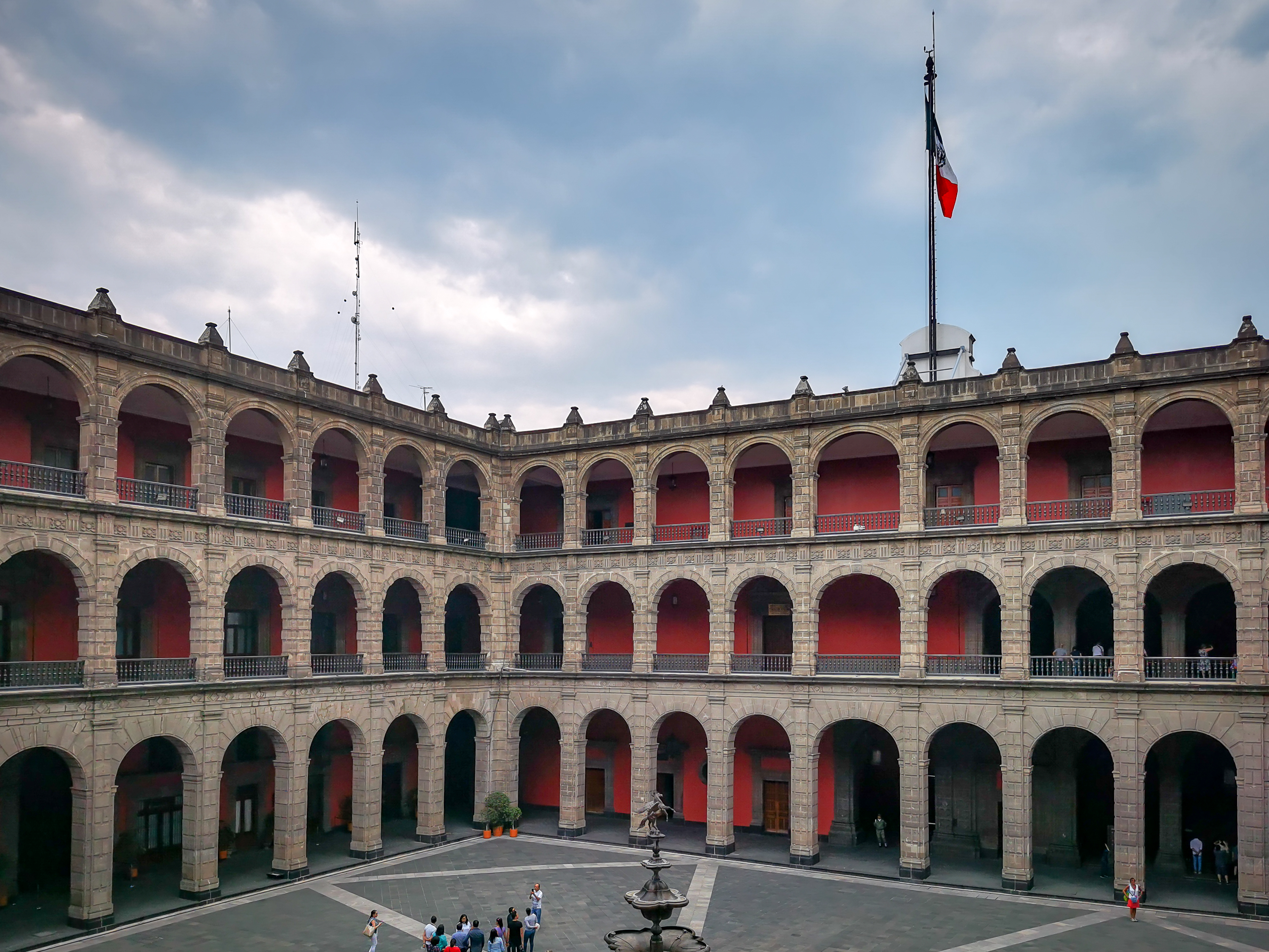 Interior Palacio Nacional Mexico